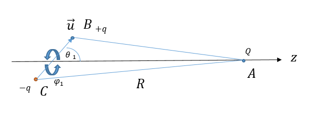 איור 2: אינטראקציית דבאיי היא אינטראקציה אלקטרוסטטית של מטען ודיפול. השדה החשמלי המושרה על ידי הדיפול על האלקטרון הוא המקור לכוחות דבאיי, שהם חלק מכוחות ואן דר-ואלס הכוללים הפועלים במערכות פיזיקליות.